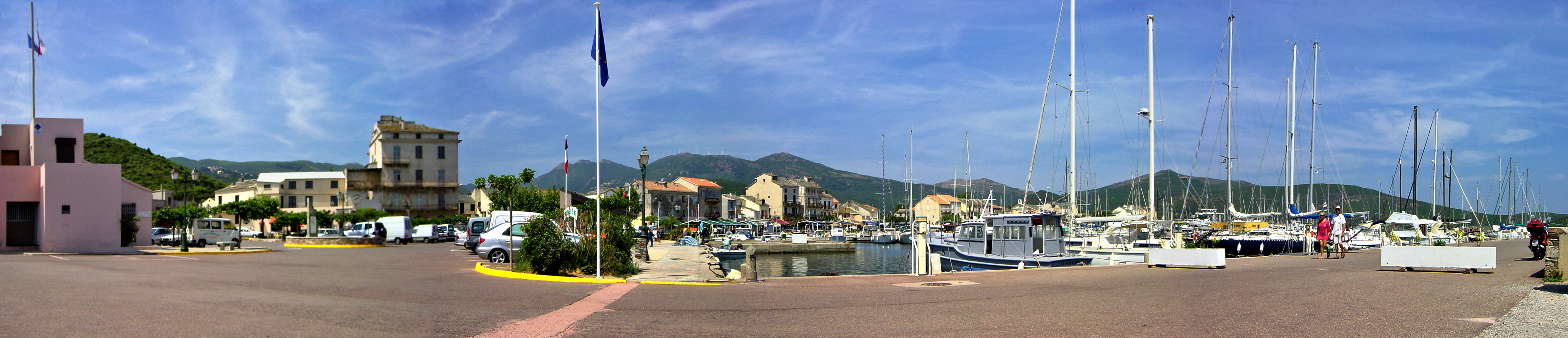 Rogliano (Corse) - Panorama du port de Macinaggio (2004)